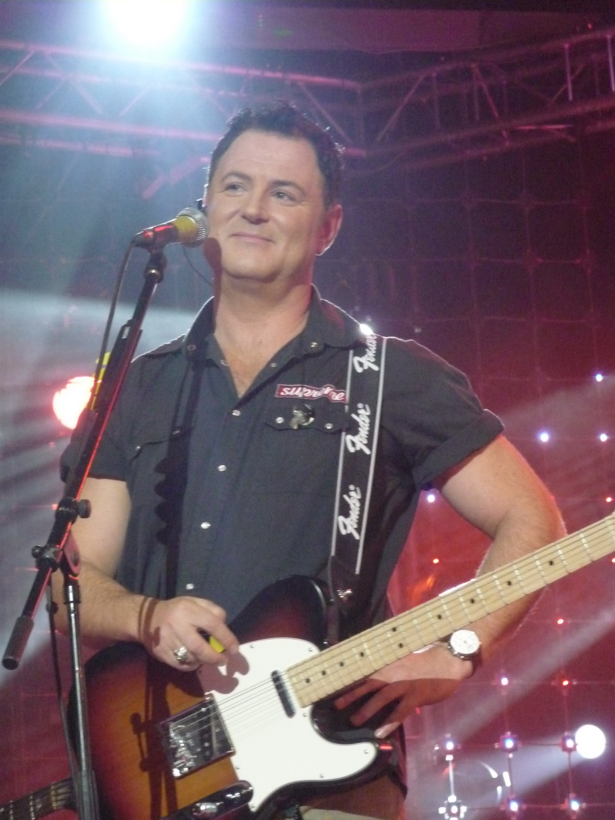 Запись программы "Открытый формат" в Гигант-Холле (СПб)